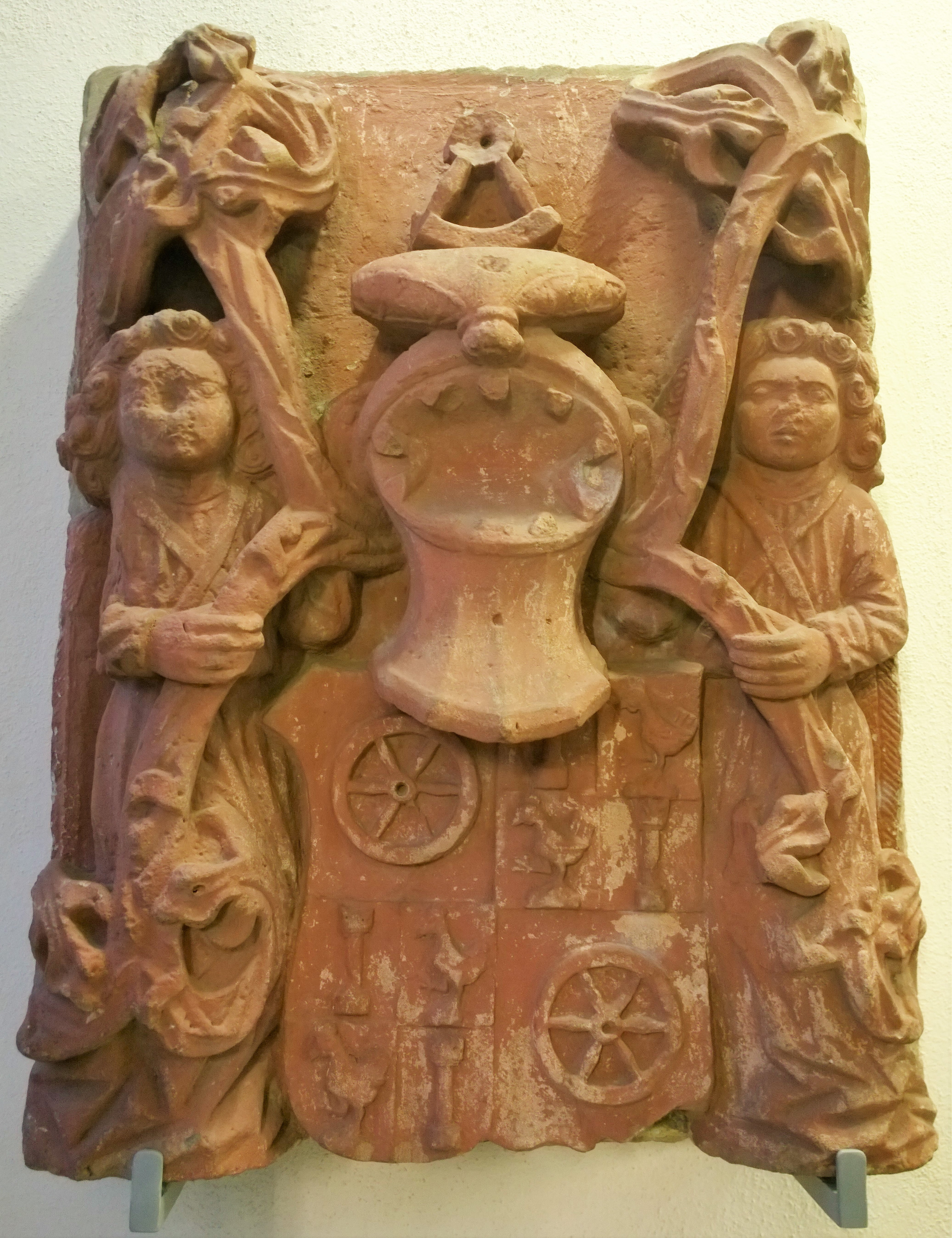 Wappenstein von Berthold von Henneberg, Mainzer Erzbischof, ehemals im Albinischloss (Burg Dieburg), heute im Aufgang zwischen Museum Schloss Fechenbach zum Schloss Fechenbach (Westseite)